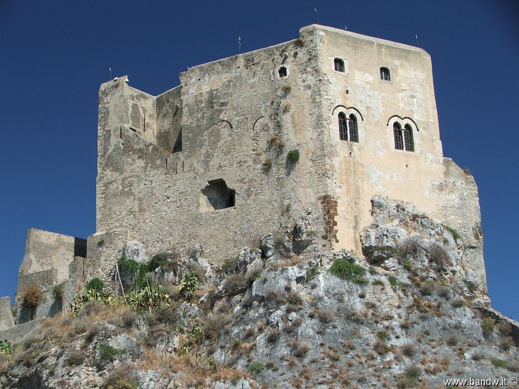 Castello Di Scaletta Zanclea